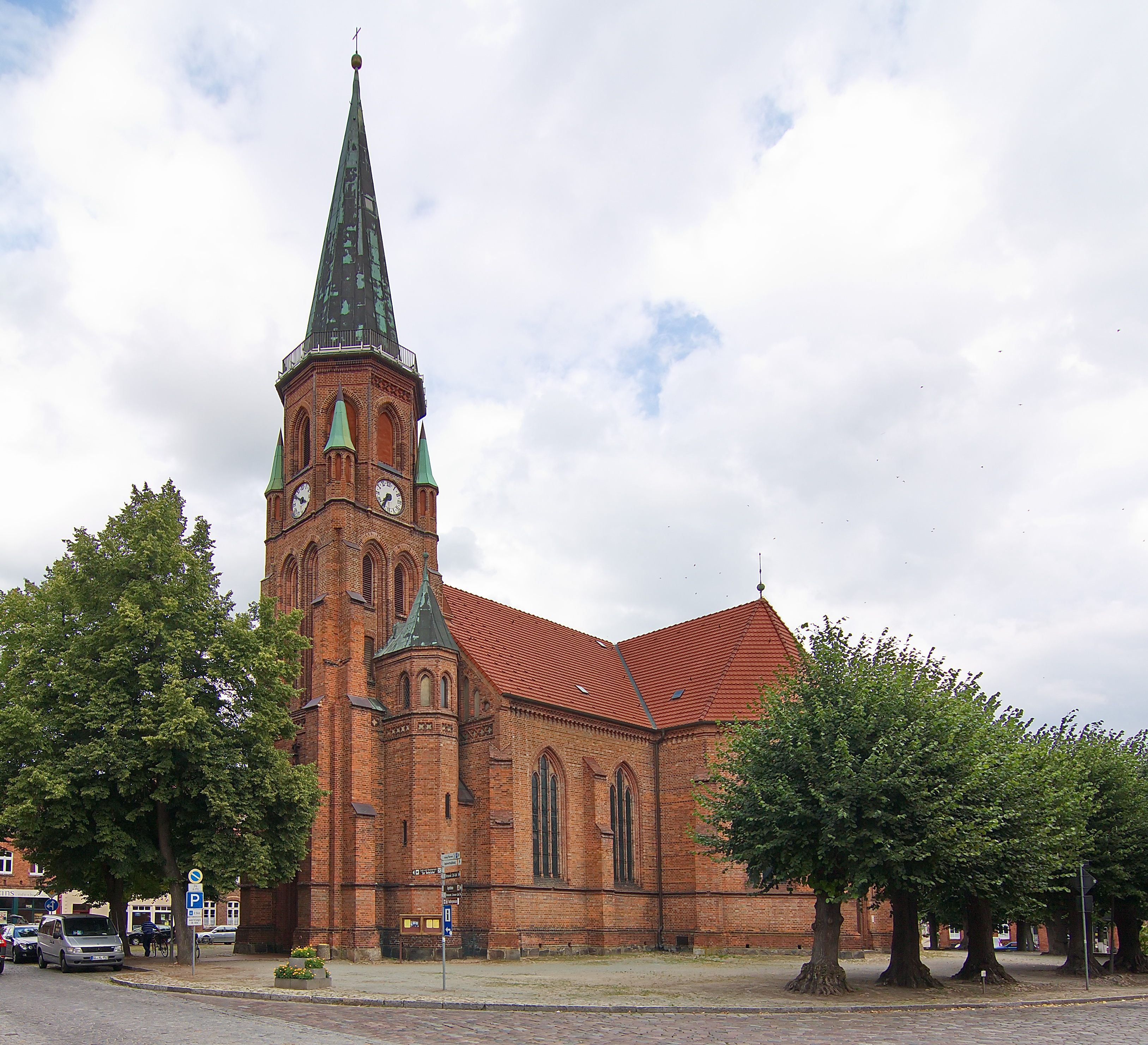 Baudenkmal in Dömitz (Mecklenburg-Vorpommern), Deutschland